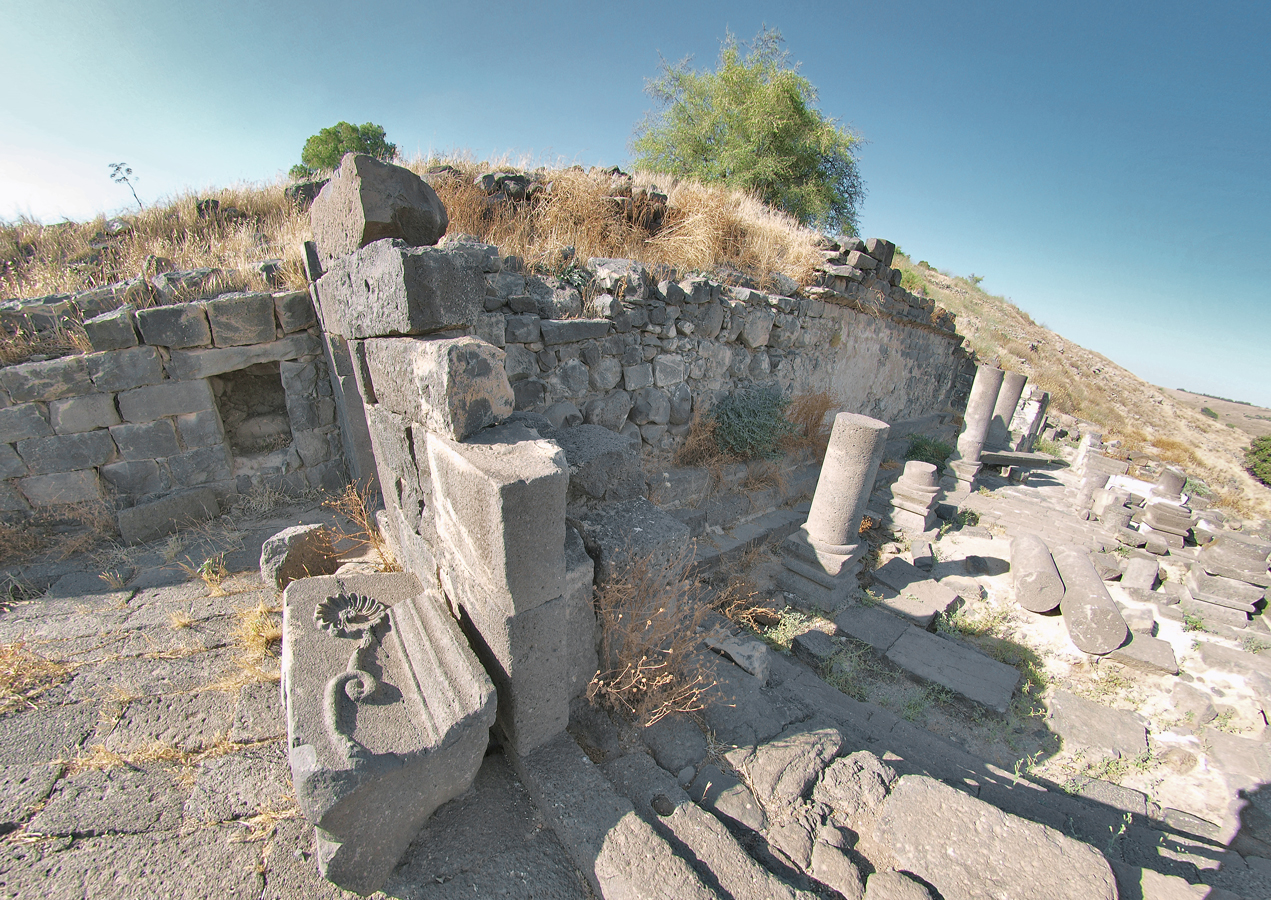 Древняя синагога рядом с мошавом Канаф